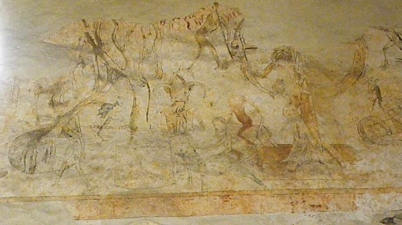 L'enfer, fresque de la première travée (sud) de l'église Saint-Pierre du Mont-Dol (35).